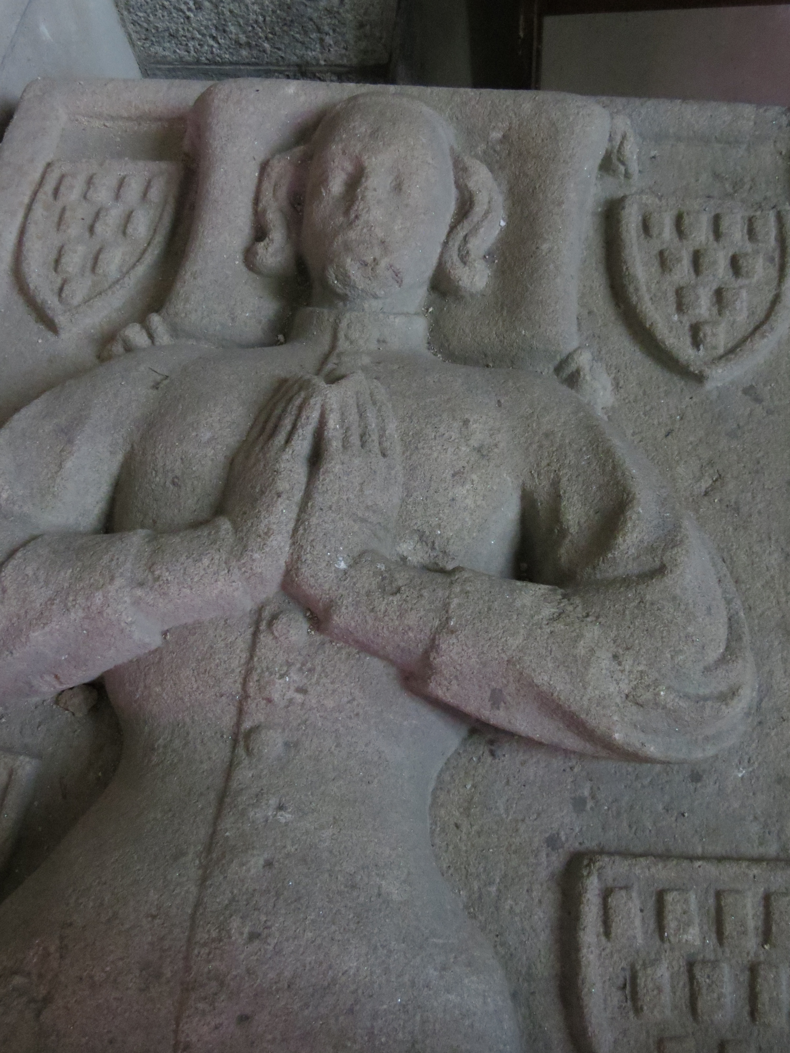 Gisant de Tiphaine Du Guesclin († 1417), nièce de Bertrand Du Guesclin, épouse de Jehan (V) de Beaumanoir.